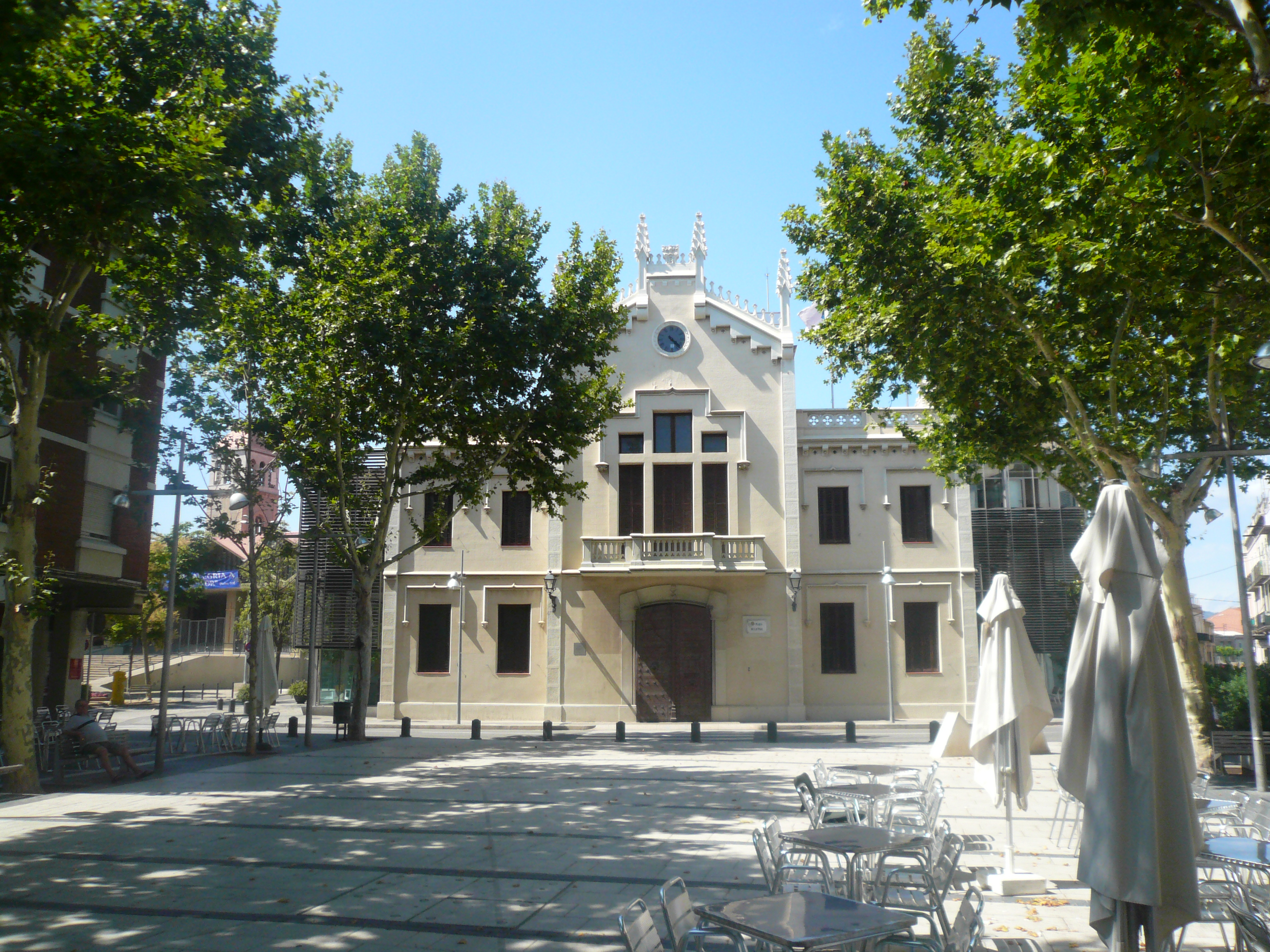 Casa del Comú (el Prat de Llobregat) Object location41° 19′ 50.78″ N, 2° 05′ 34.98″ E